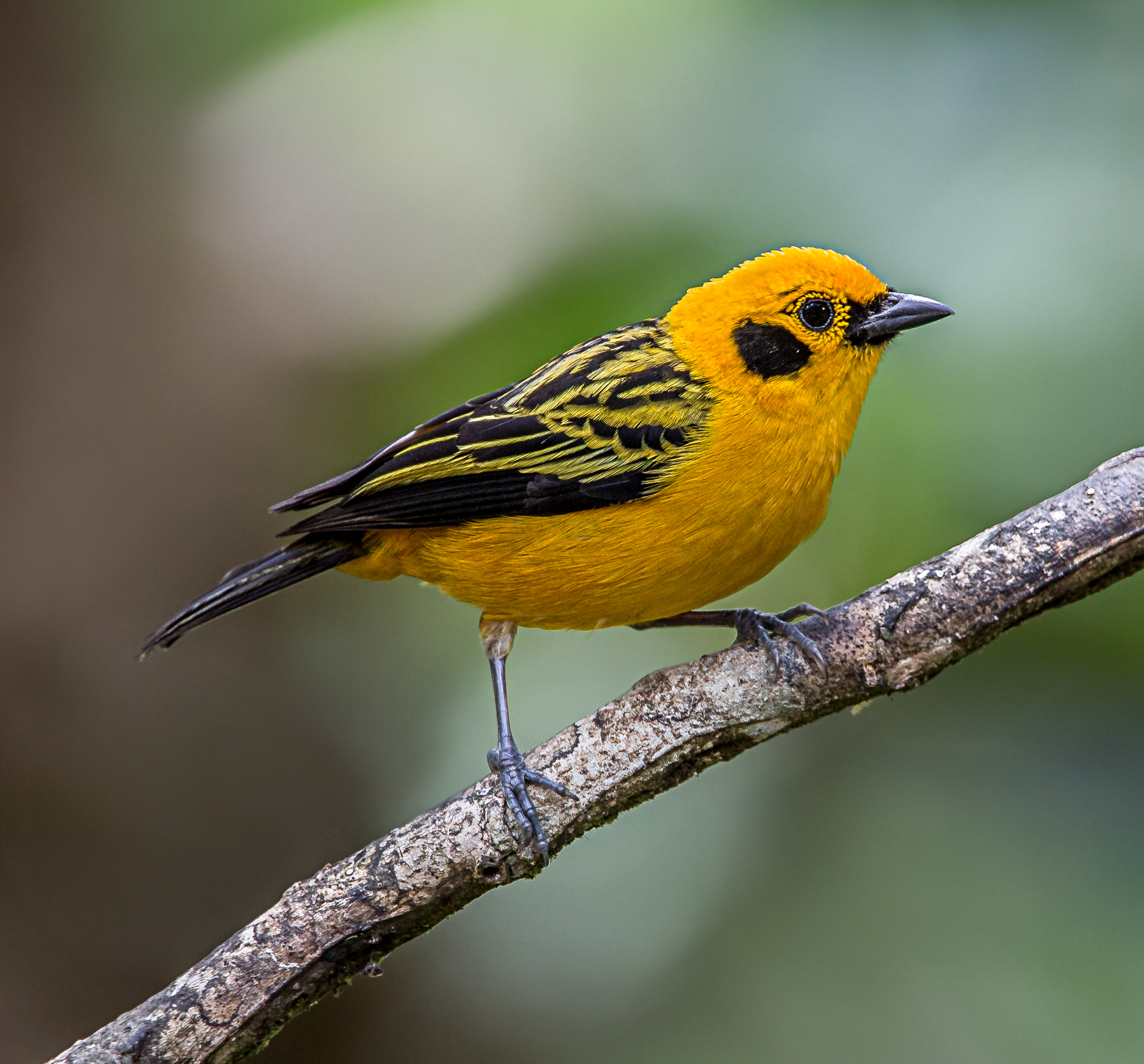 Taken at Tandayapa Bird Lodge, Ecuador.